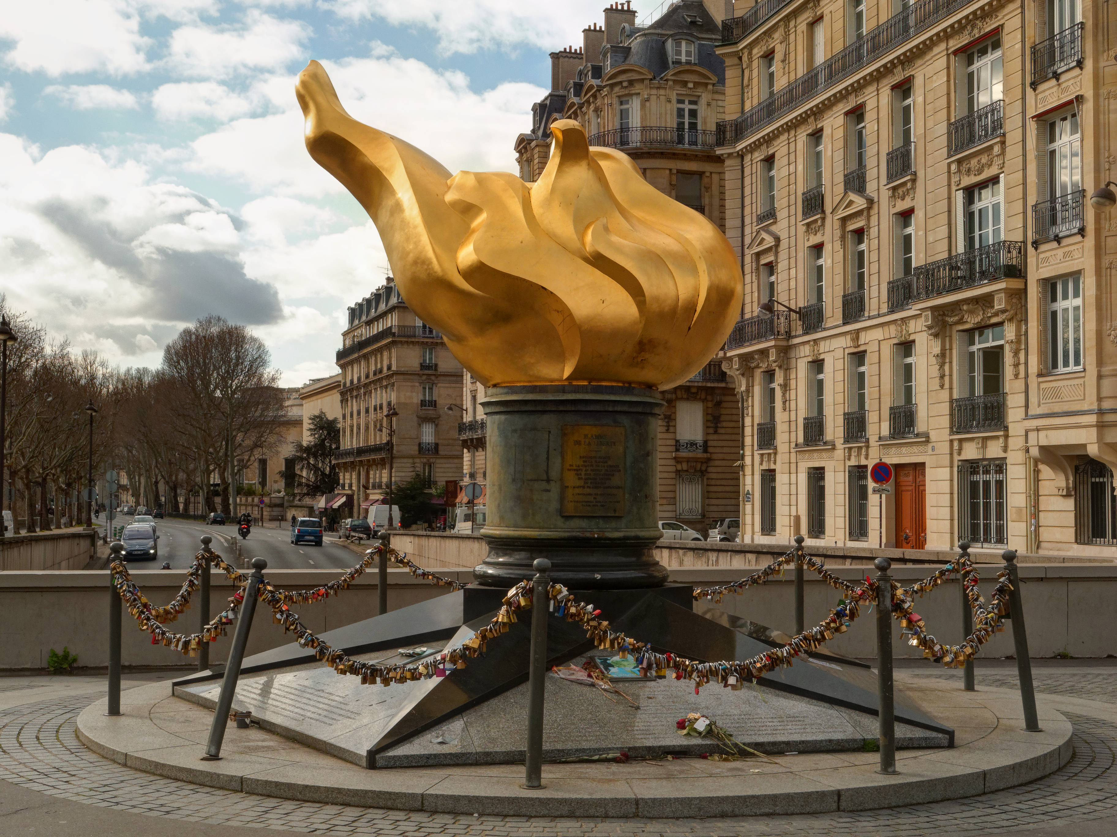 Paris : Flamme de la Liberté.